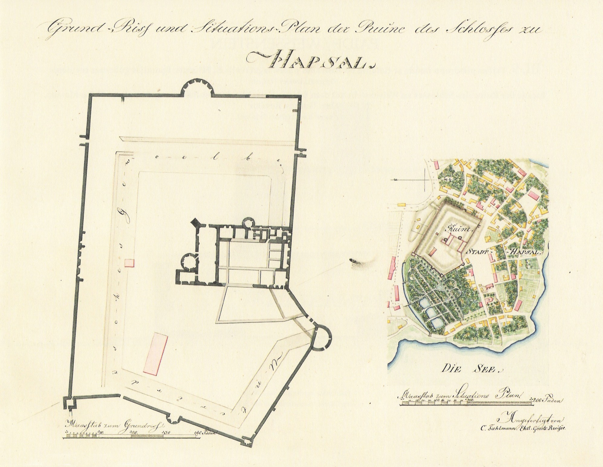 Haapsalu linnuse asendiplaan. Paulucci album